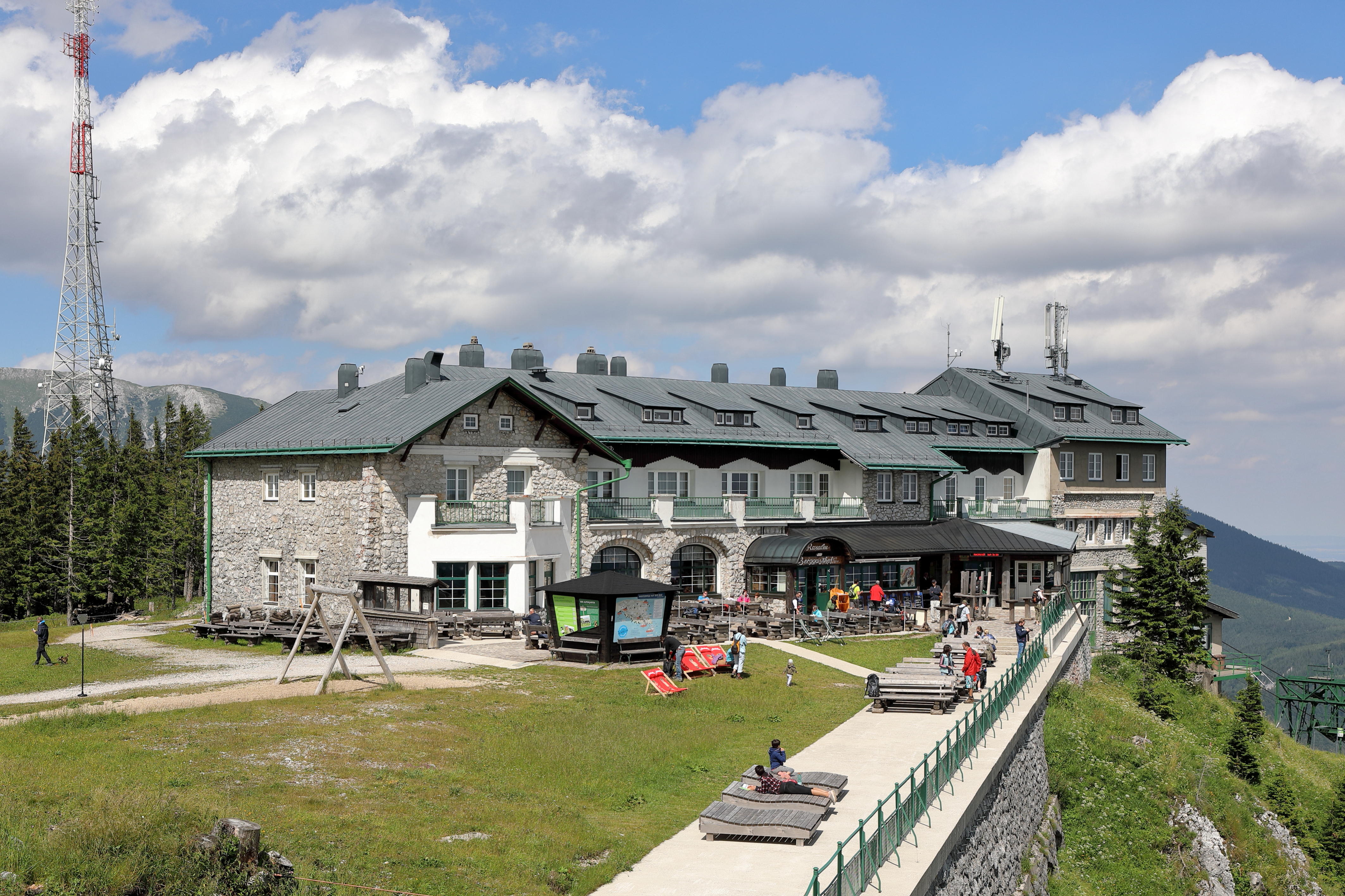 Südwestansicht des Raxalm-Berggasthofes auf der Rax in der niederösterreichischen Marktgemeinde Reichenau an der Rax und ganz rechts die direkt angebaute Bergstation der Raxseilbahn.Der Gebäudekomplex aus Bruchstein mit Verputzelementen wurde im Zuge der Errichtung der 1. Seilschwebebahn Österreichs 1925/26 gebaut.